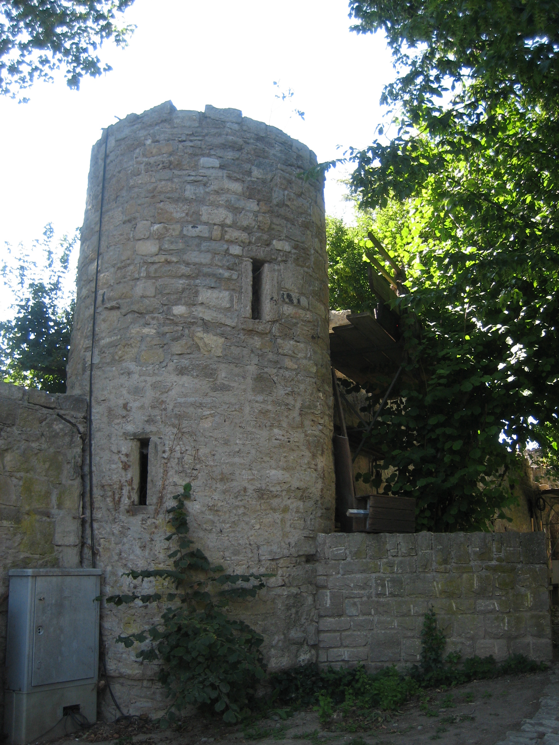 Lage: Am Geyerschloß 7, Giebelstadt bei Würzburg, Franken / Bayern, Deutschland Objektbeschreibung: Schlossruine, laut Liste des Baudenkmälder Ruine des Geyerschlosses, urspr. Rechteckanlage mit Ringgraben, 14./16. Jahrhundert. Das Bild zeigt den Turm rechts vom Eingangstor im Osten der Ruine. This is a photograph of an architectural monument.